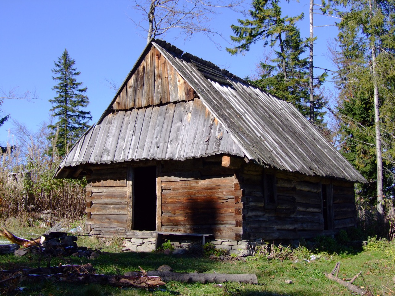 Szałas pasterski na grzbiecie Piorunowca w Gorcach